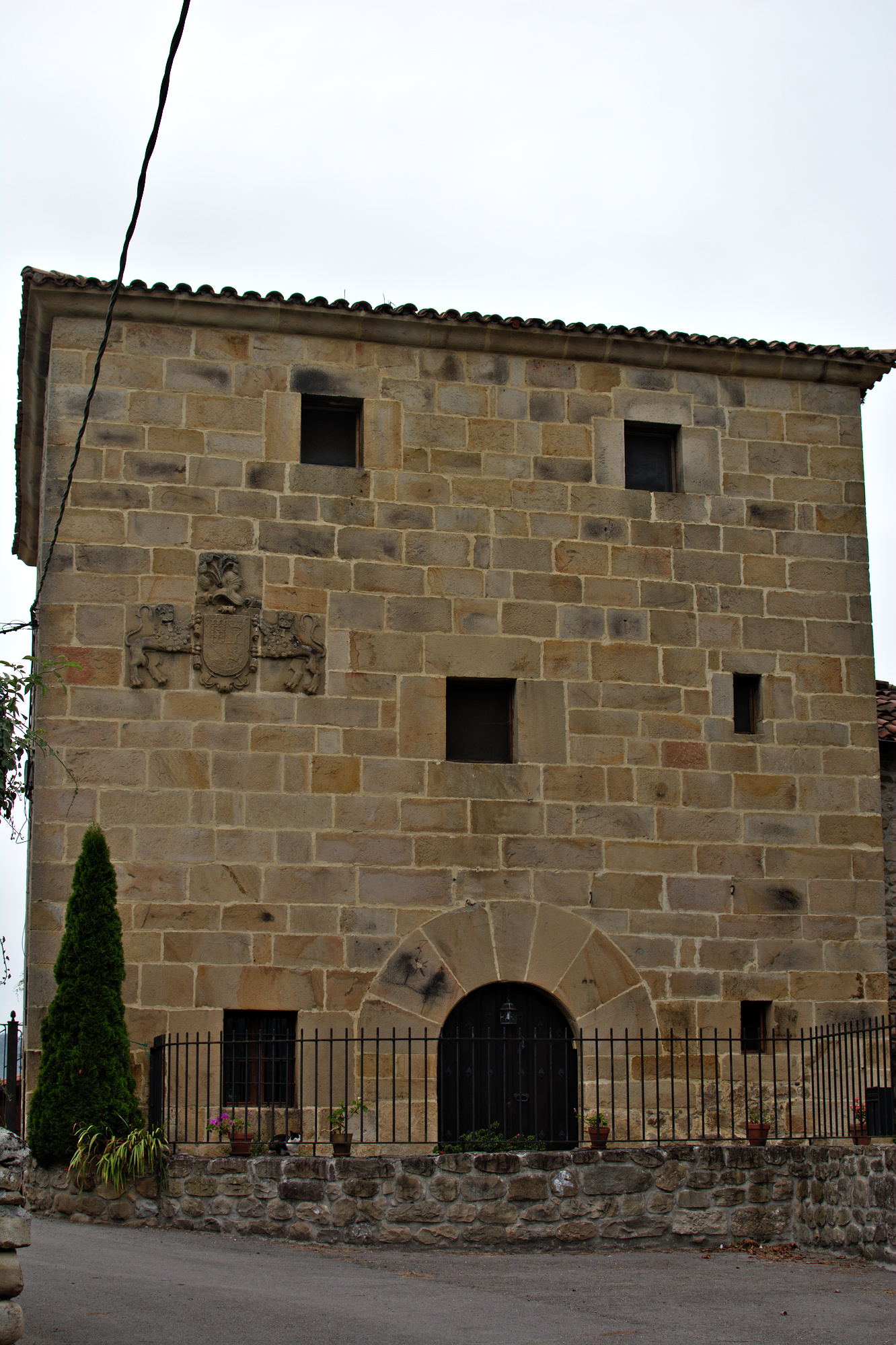 Torre de Agüero